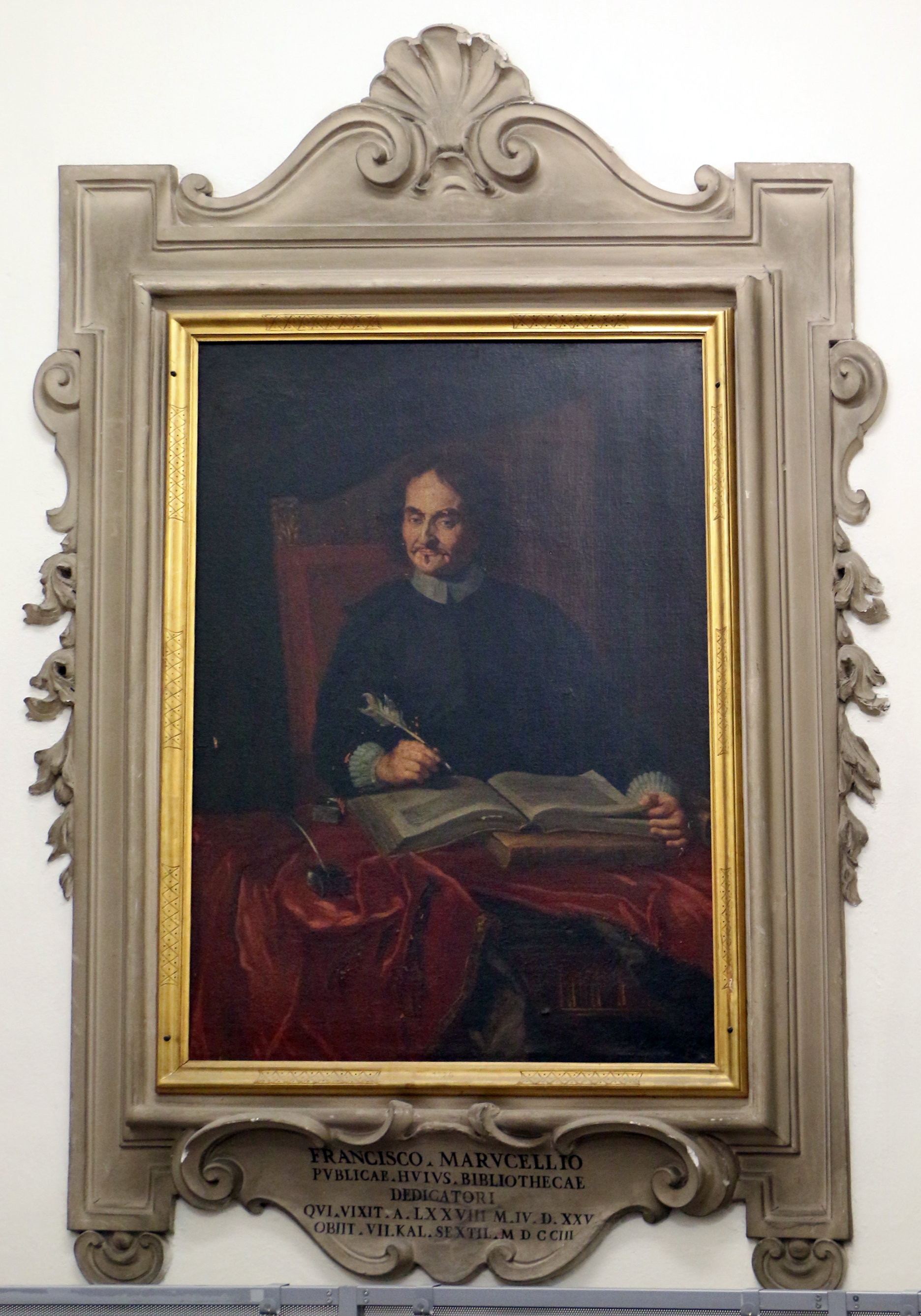 Biblioteca Marucelliana This is a photo of a monument which is part of cultural heritage of Italy.